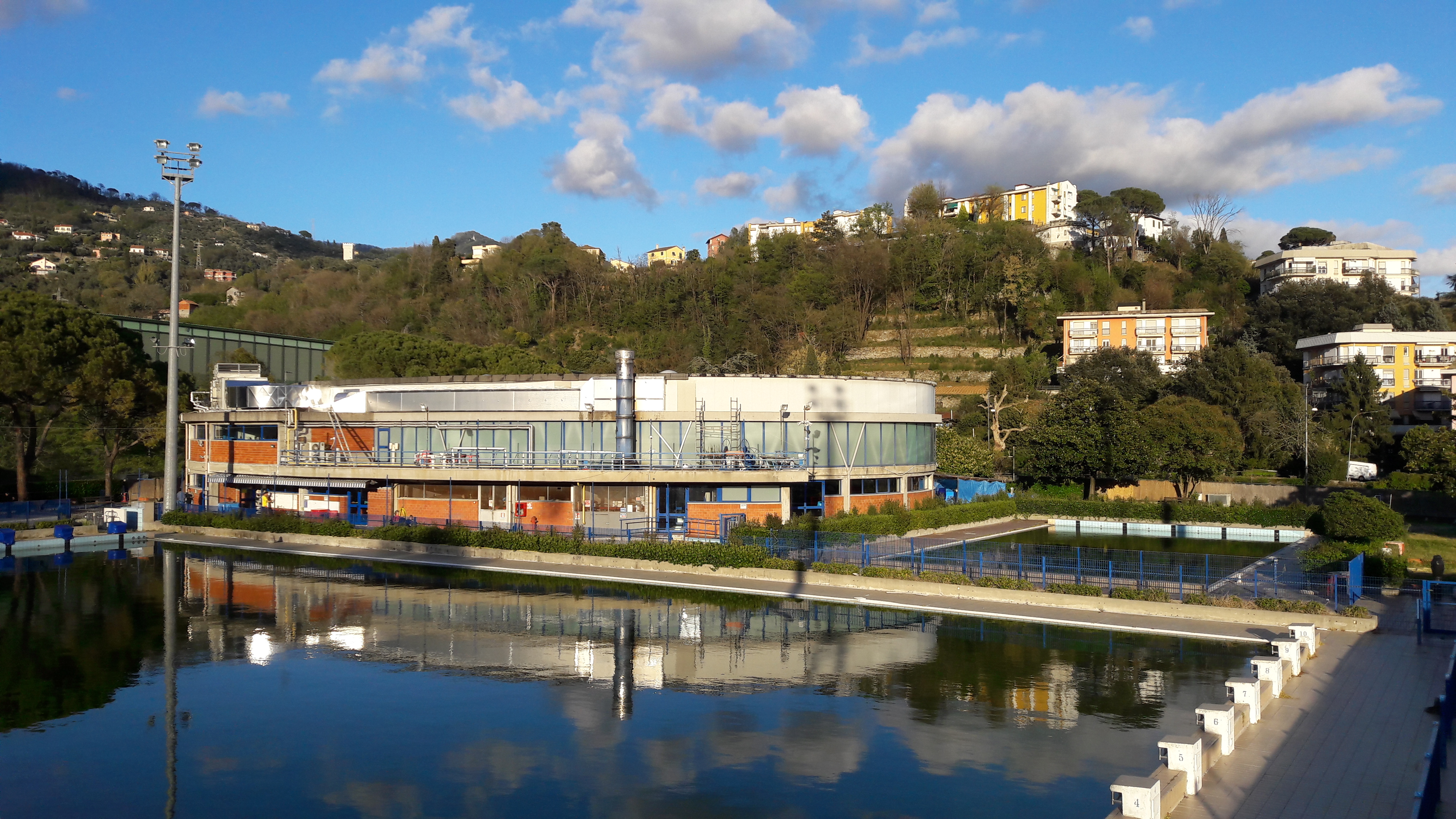 L'impianto natatorio olimpionico del Poggiolino, Rapallo, Liguria, Italia